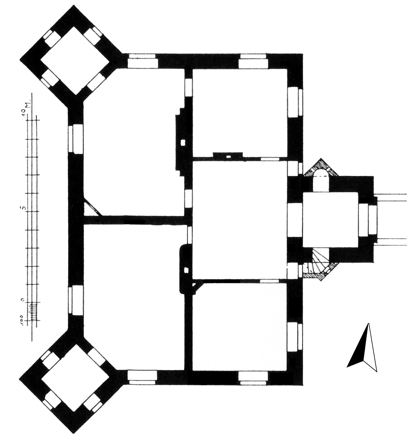 grundriss des Herrenhauses von Schloss Effeld